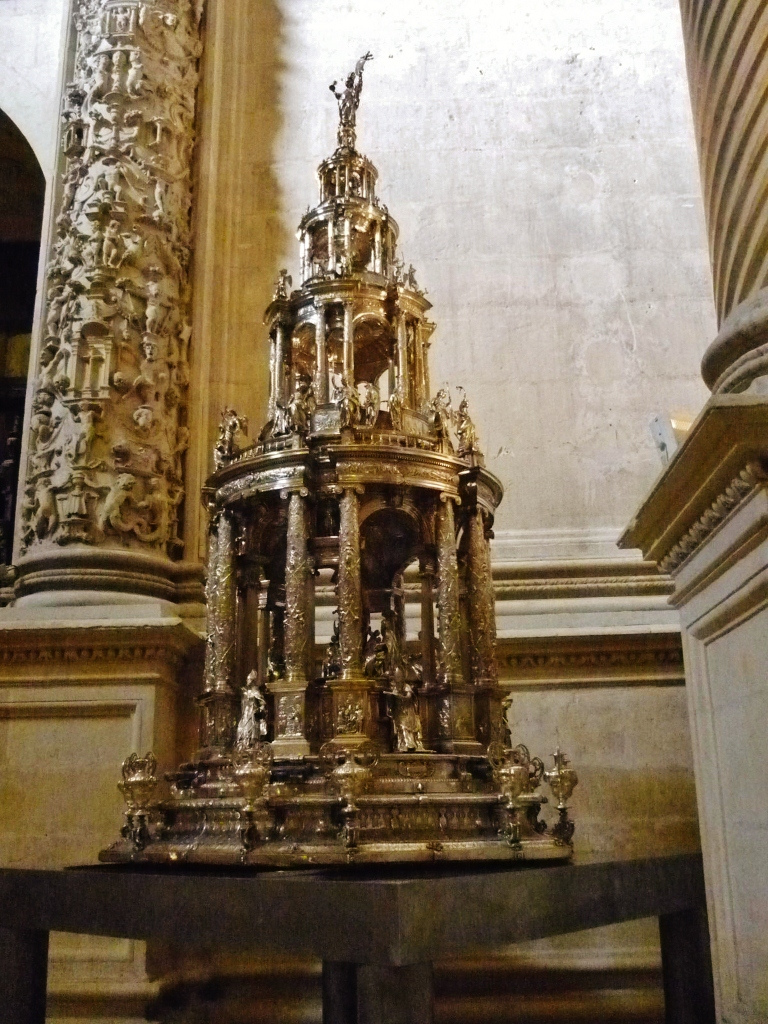 La custodia procesional de la catedral de Sevilla, (España), fue realizada por el célebre orfebre Juan de Arfe entre los años 1580 y 1587, y en su construcción se emplearon más de 300 kilos de plata. Actualmente esta obra está expuesta permanentemente en la Sacristía mayor de la catedral de Sevilla, y es una de las obras de orfebrería más destacadas del tesoro catedralicio hispalense.